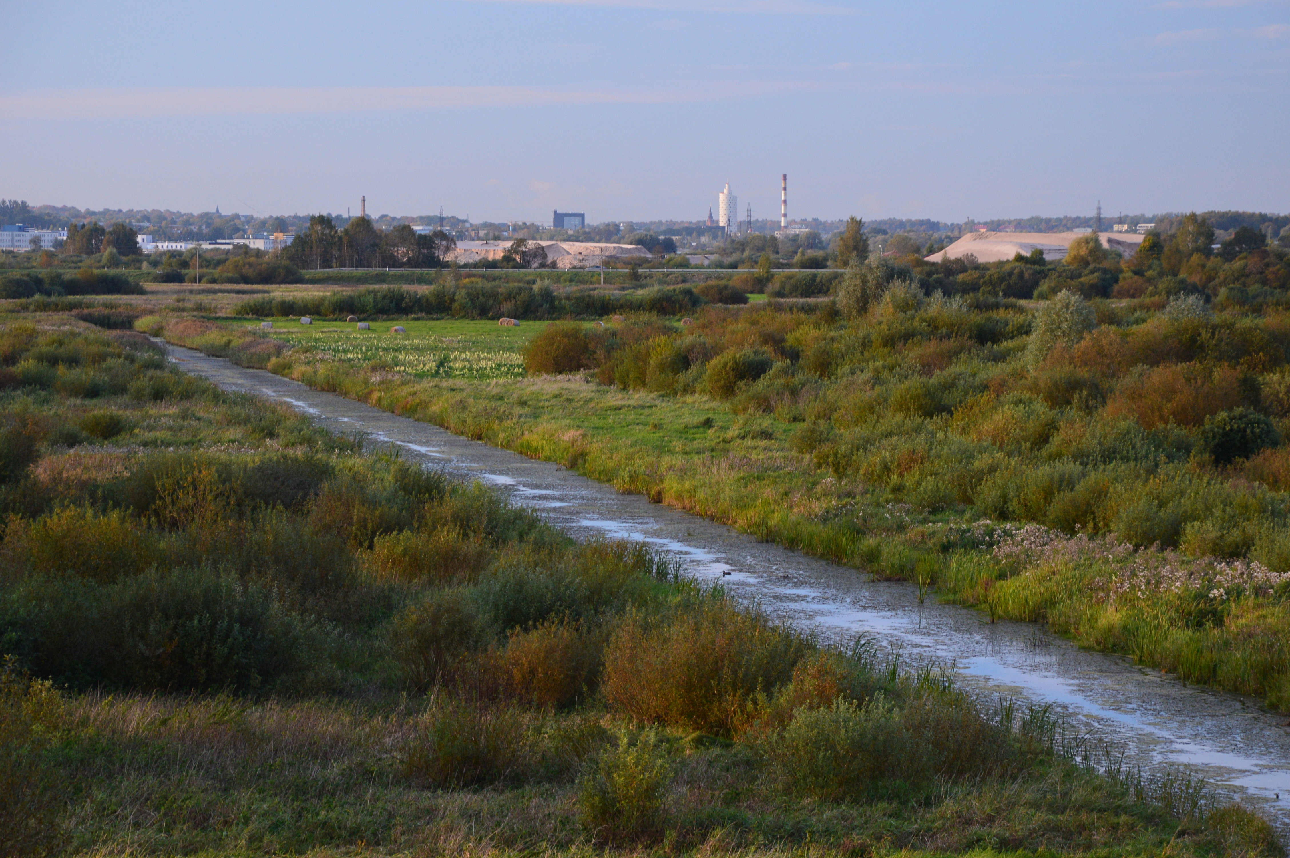 Ropka-Ihaste looduskaitseala.